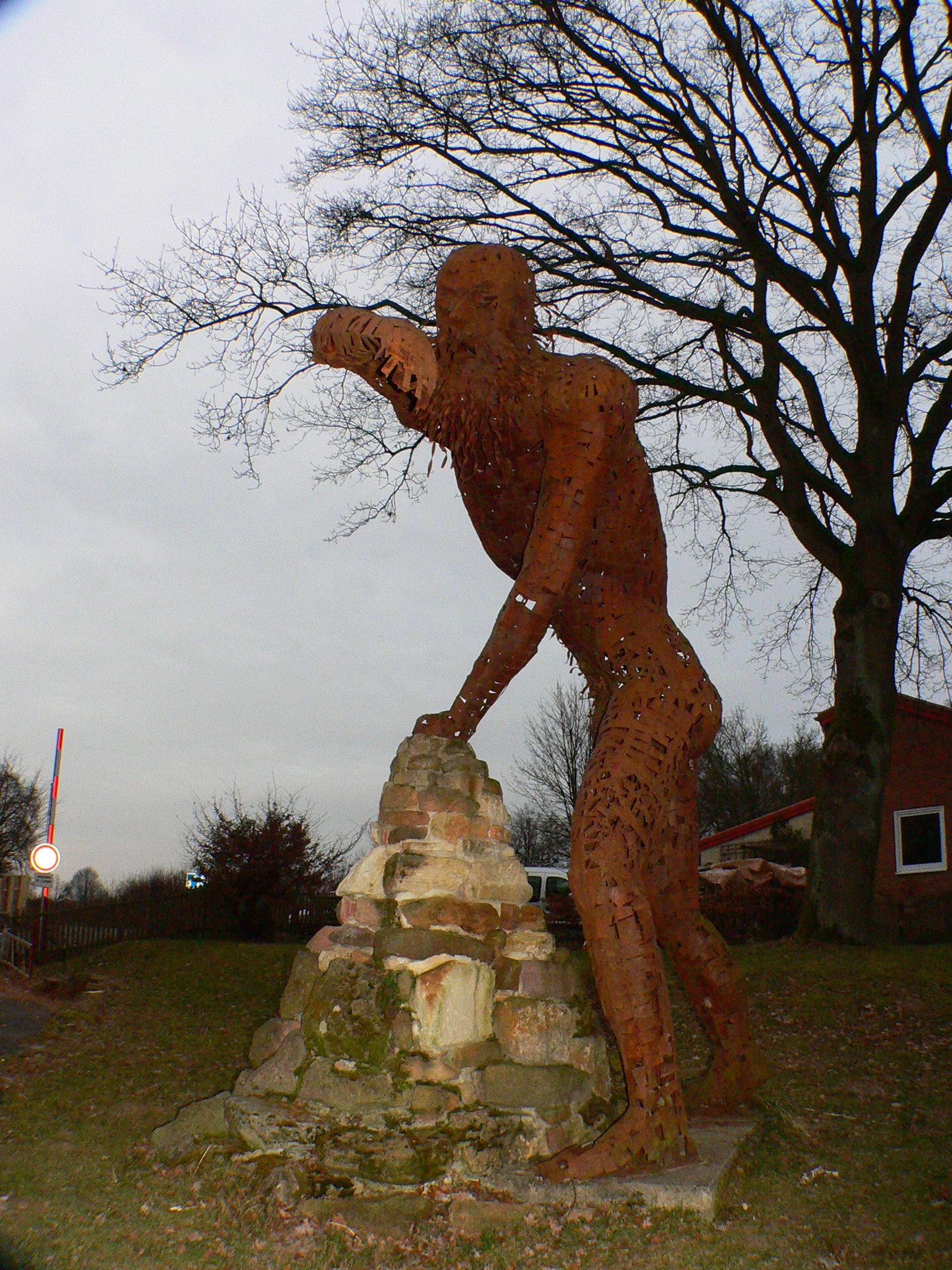 Robert Colnago: "Der Riese" vor dem Eingang zur Jugendburg Sensenstein, Niestetal, Kreis Kassel